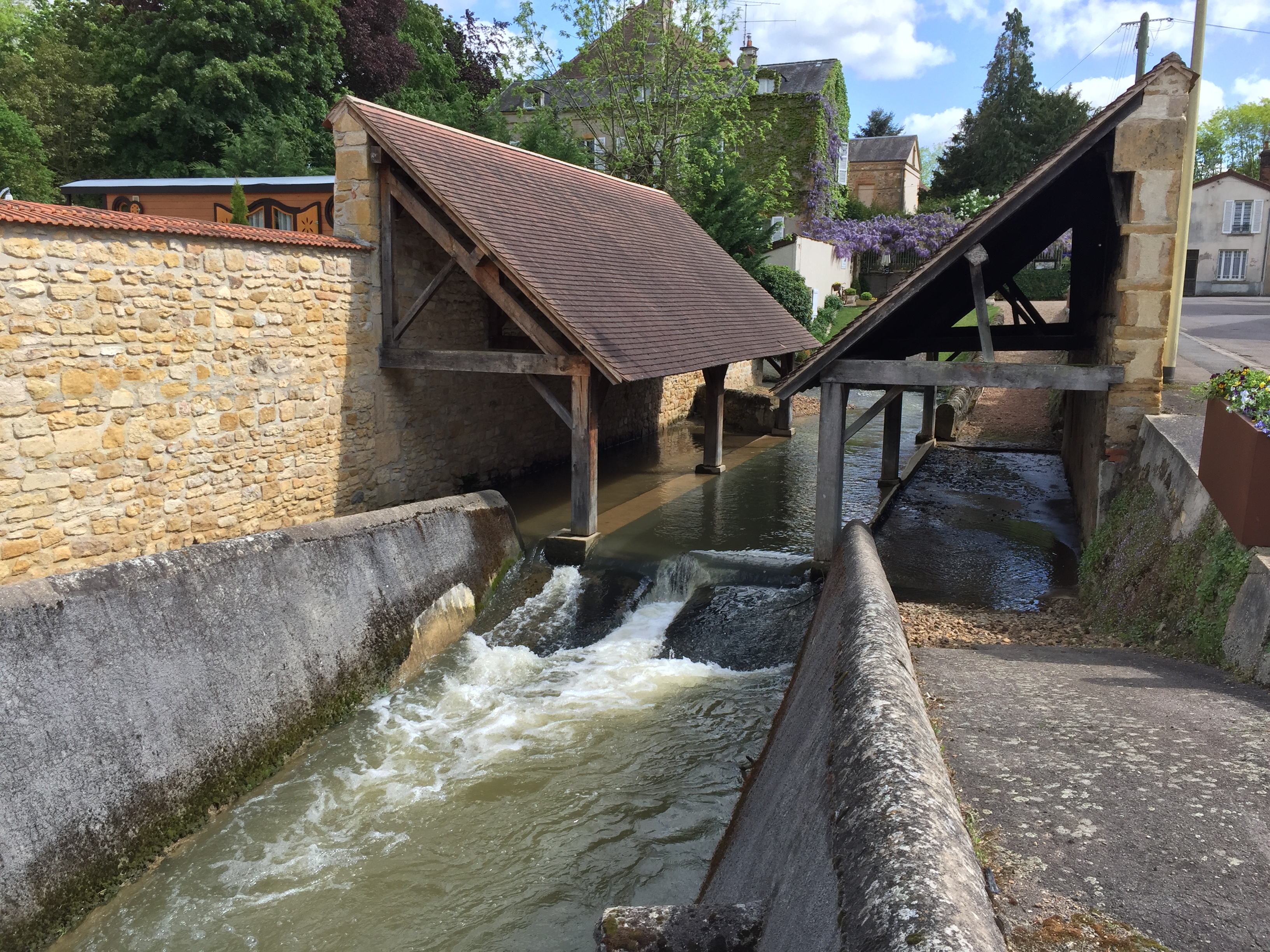 Lavoir traversé par le Merdasson dans la ville de Marcigny